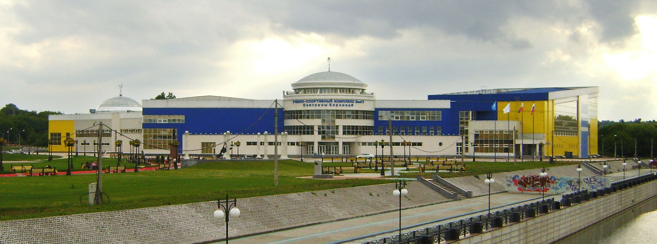 Вид от реки Везелки на Комплекс Светланы Хоркиной. Белгород.